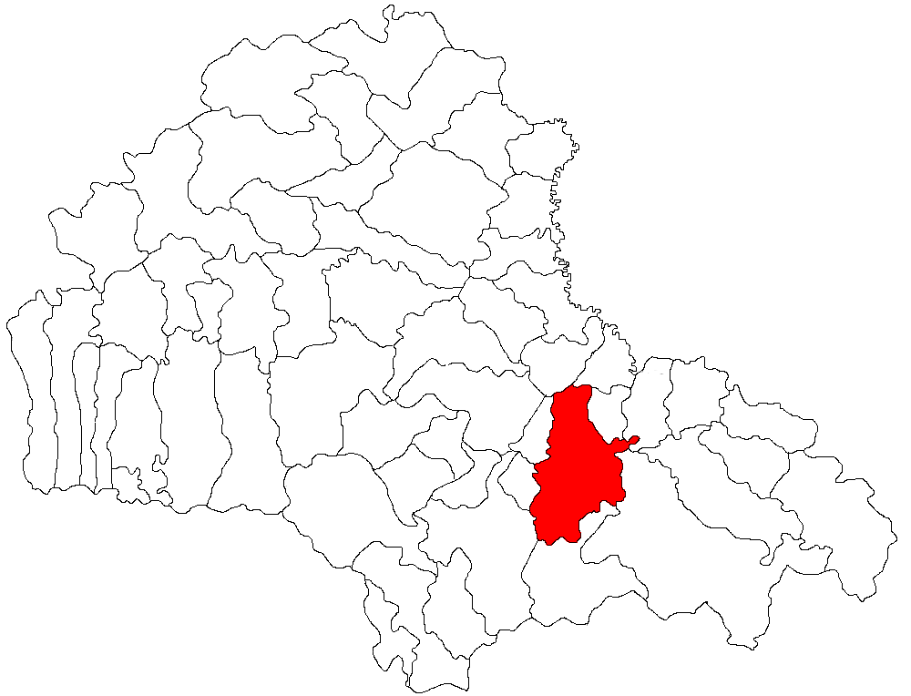 Categorie:Hărţi ale judeţului Braşov